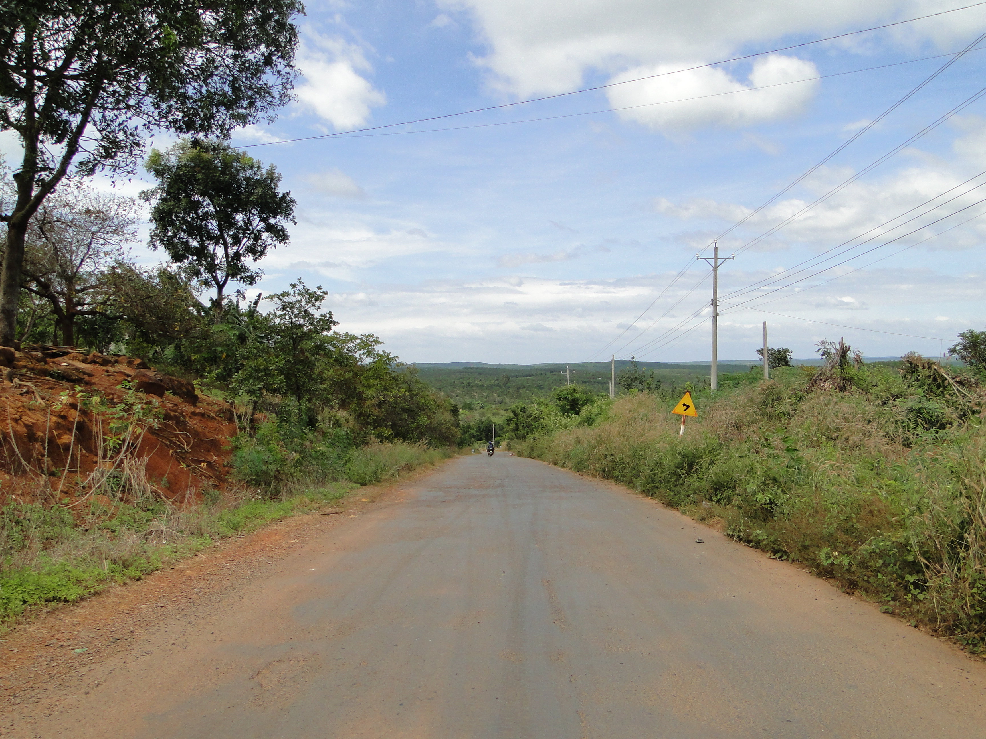 Huyện Bù Đăng, Bình Phước